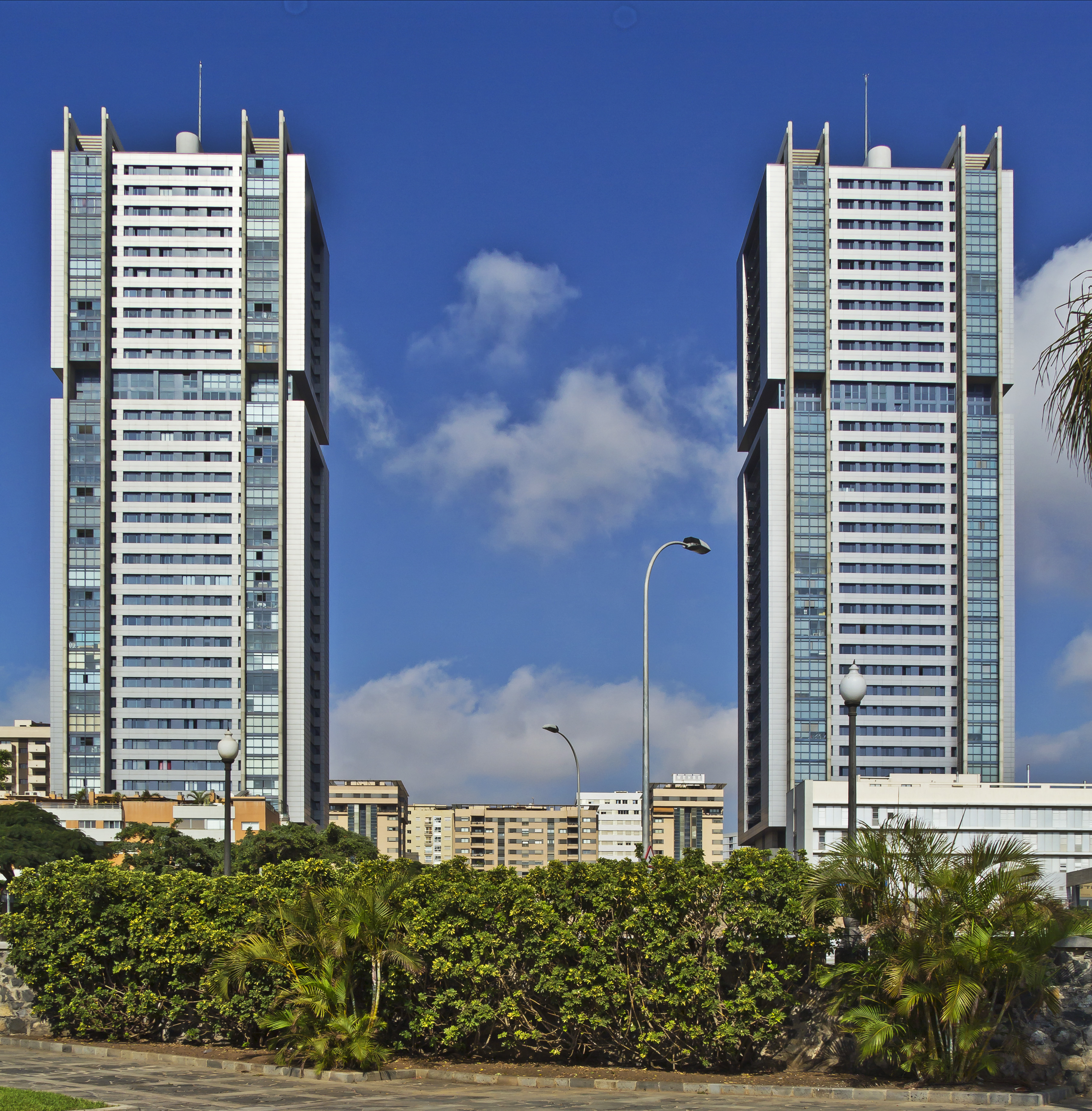 Die zwei Gebäude Las Torres de Santa Cruz wurden von dem Architekten Julián Valladares Hernández entworfen. Sie sind 120 Meter hoch und wurden im Jahr 2004 bzw. 2006 fertiggestellt.